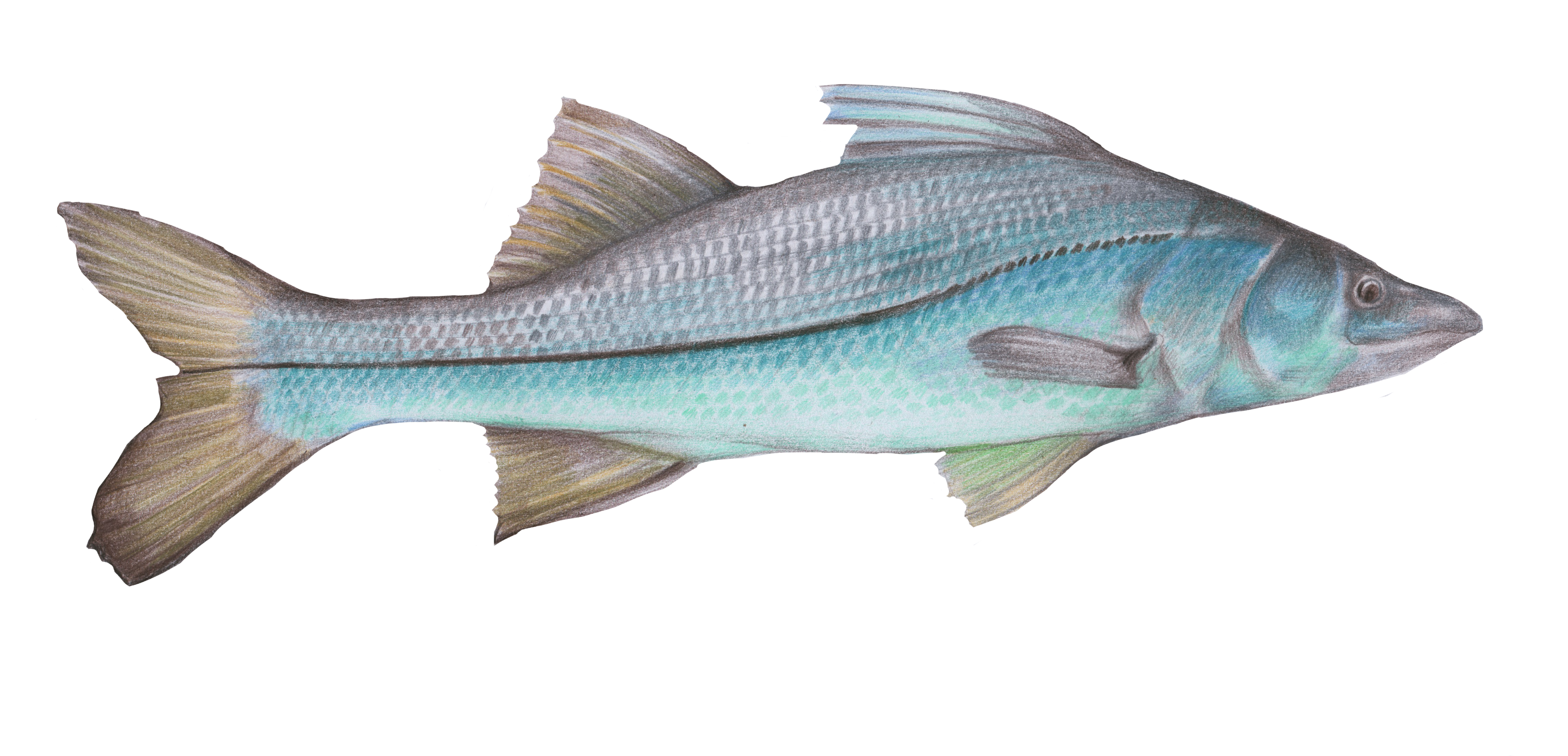 Desenho à lápis do robalo branco. Desenho originalmente comissionado pela ONG Rare Brazil (